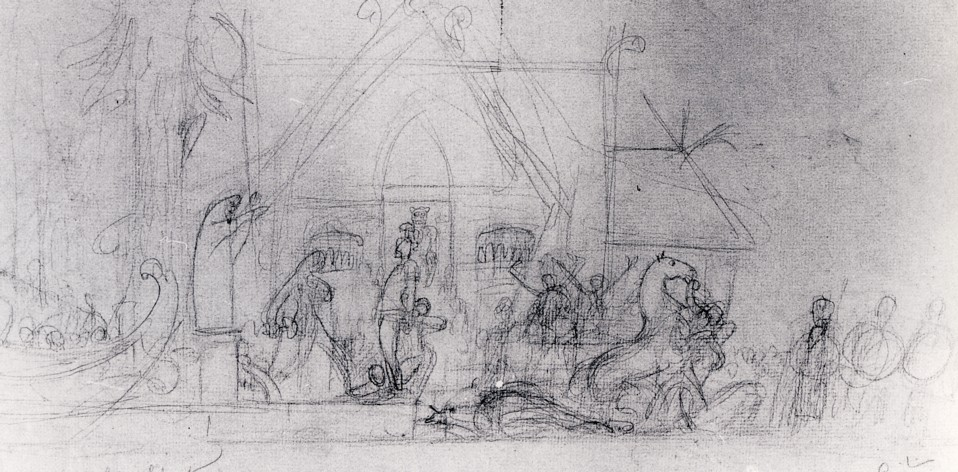 Carl Larsson, Midvinterblot, förstudie 1910. Blyerts 29 x 59 cm.